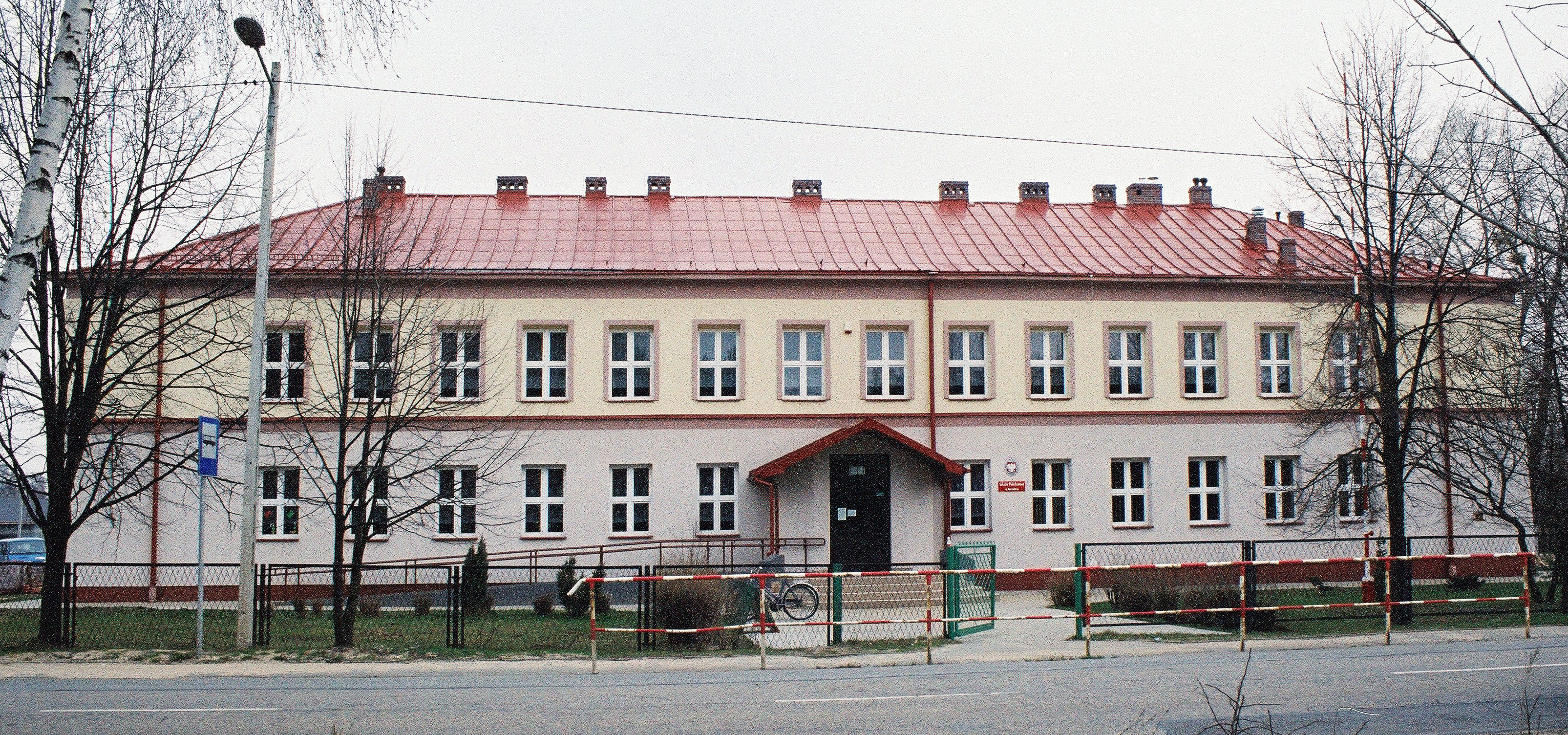 Szkoła Podstawowa w Nieradzie z 1958 roku, położona w Michałowie